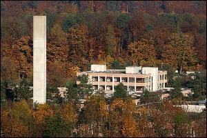 Psychiatrie-Zentrum Hard Embrach